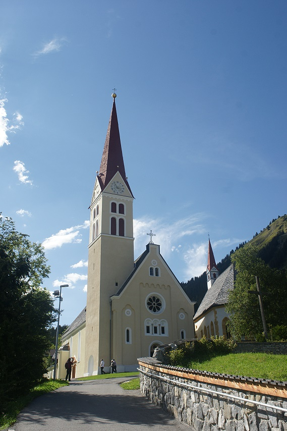 Kath. Pfarrkirche Unsere Liebe Frau Mariae Himmelfahrt, Friedhof mit Sebastianskapelle u. Kriegerdenkmal